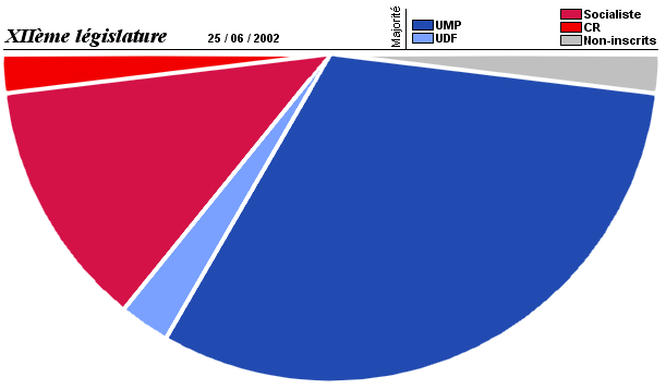 Composition de l'Assemblée Nationale après formation des groupes politiques (au lendemain des élections législatives de 2002).